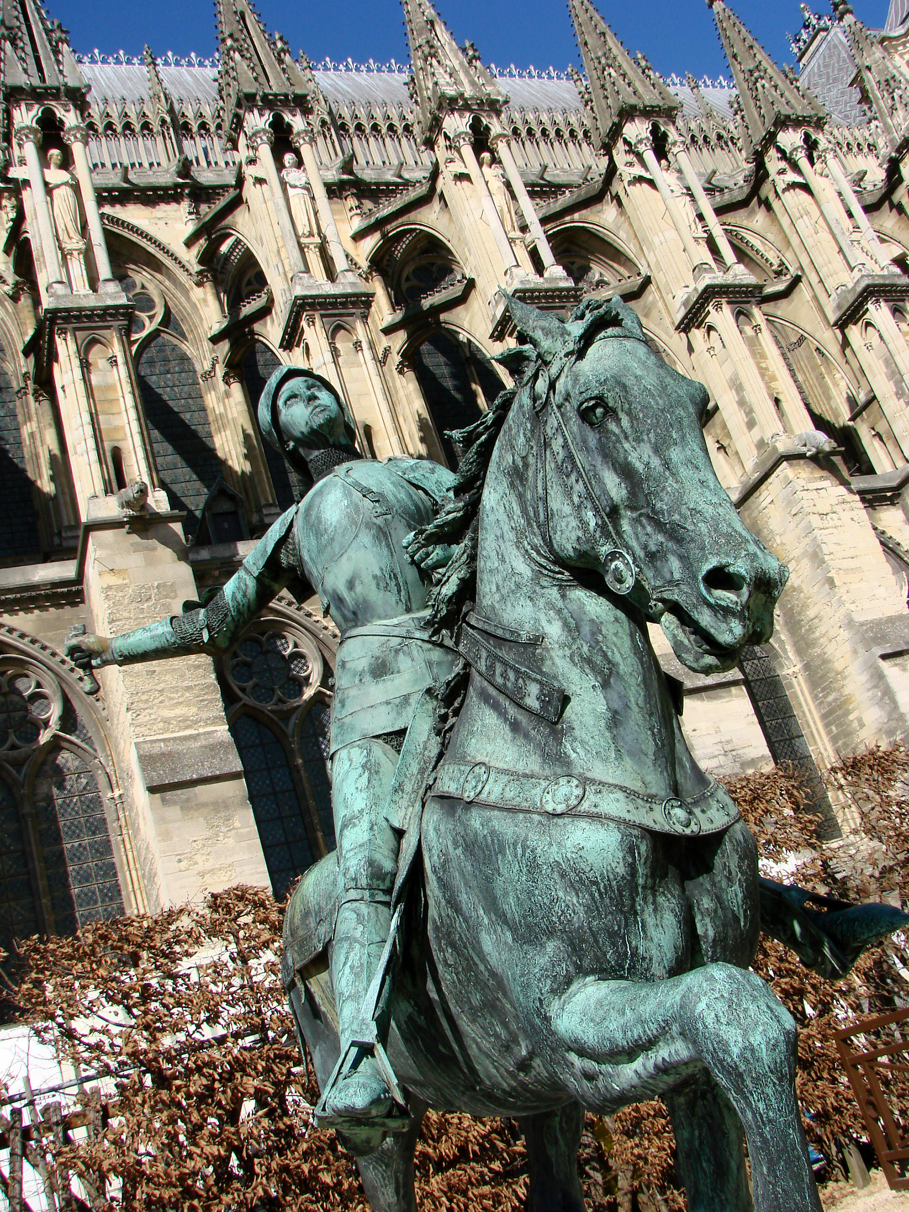 Statue de Jeanne d'Arc,déposée au Palais du Tau pendant les travaux du parvis de la cathédrale de Reims.